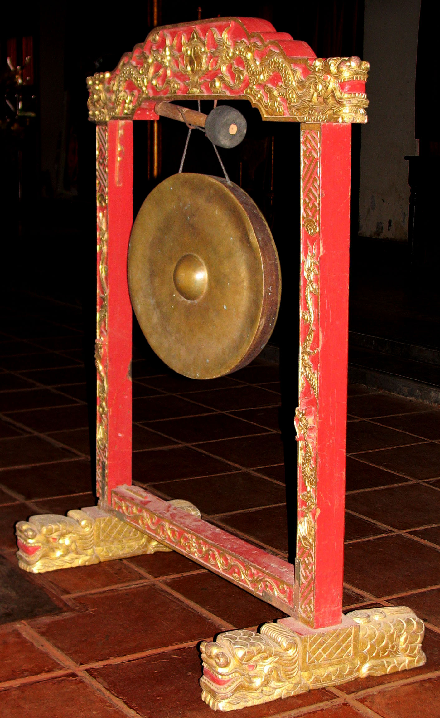 Gong.